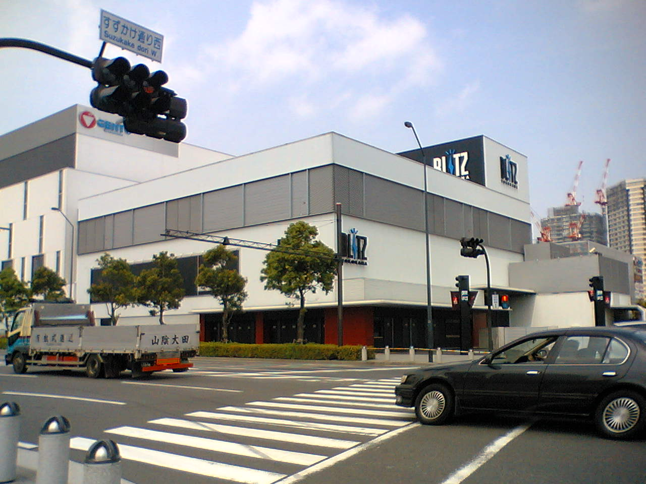 横浜BLITZ (Yokohama BLITZ)2007年5月24日投稿者が撮影